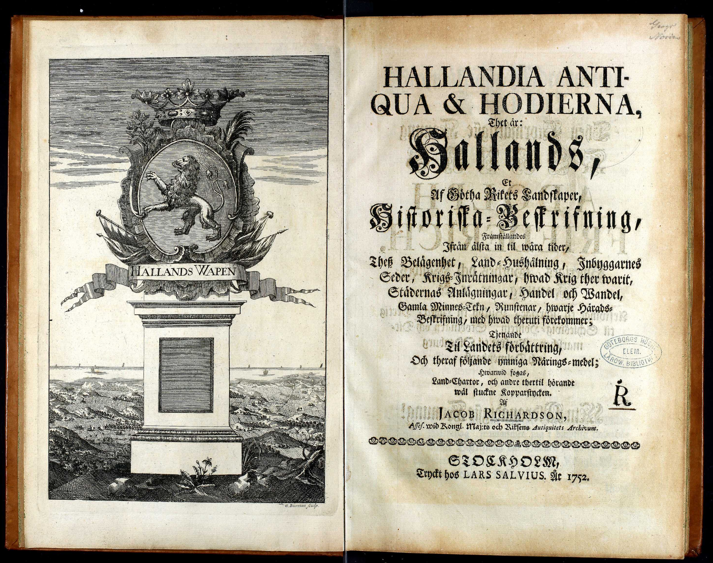 Hallandia antiqua & hodierna. Title page and frontispiece